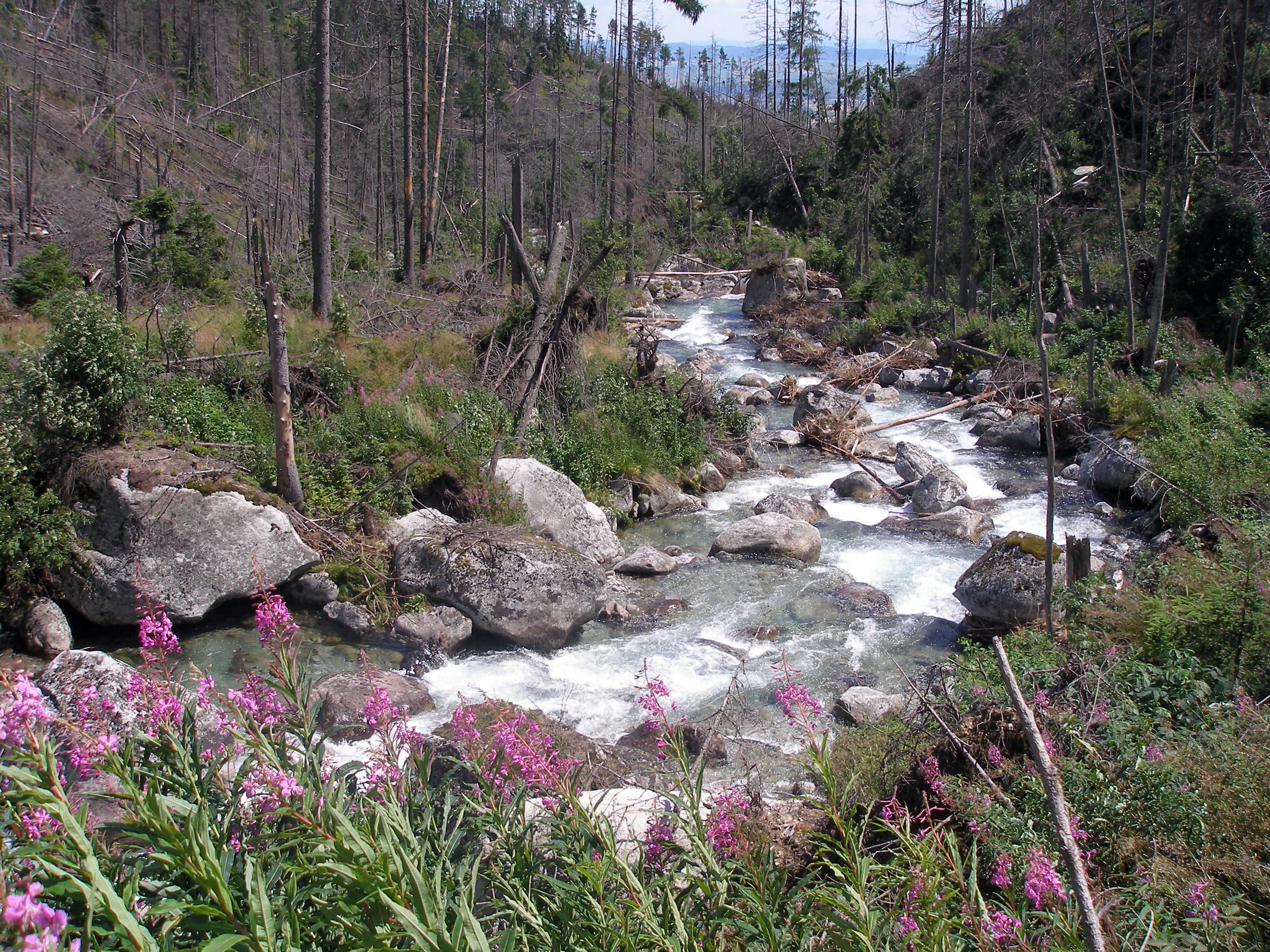 Dolina Studeného potoka nad Tatranskou Lesnou